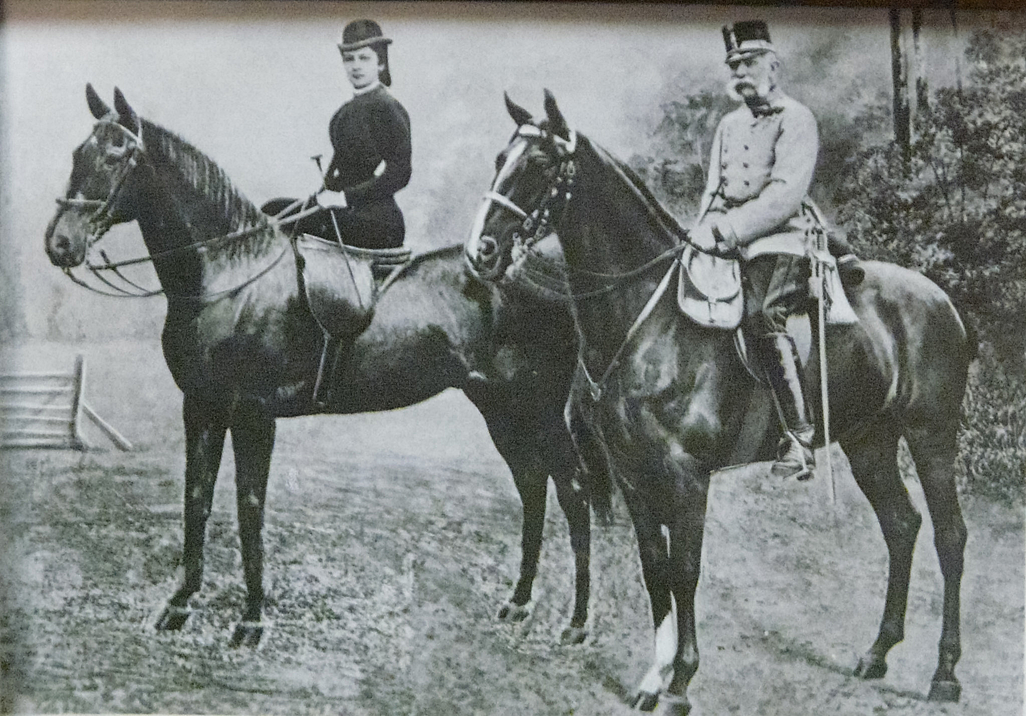 Kaiser Franz Josef I und Kaiserin Elisabeth